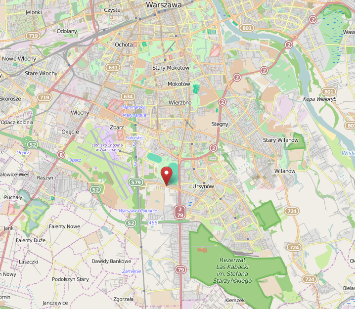 Lokalizacja Laboratorium Głównego CEZAMAT This map may be incomplete, and may contain errors. Don't rely solely on it for navigation.